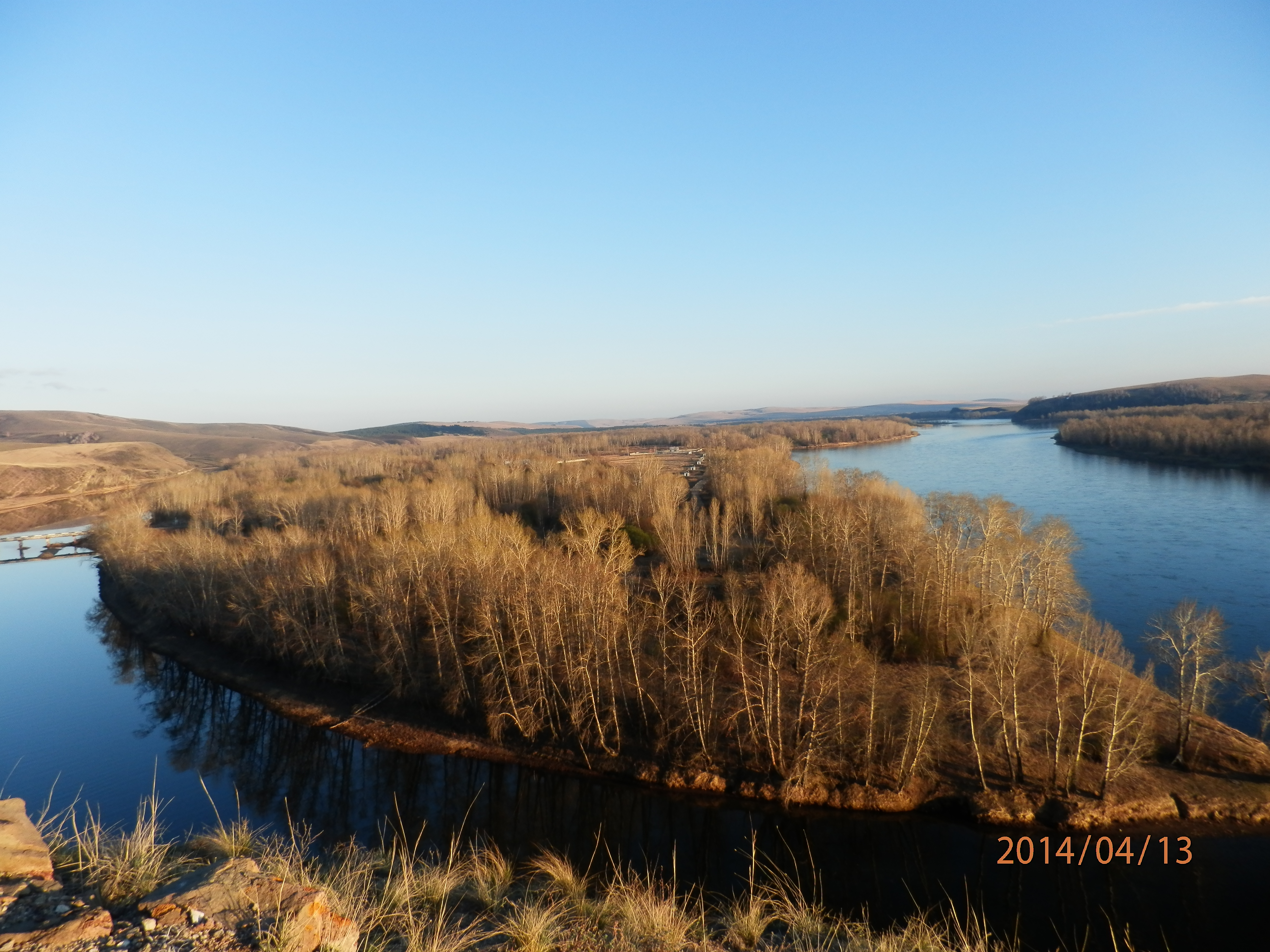 Вид со скалы, весна